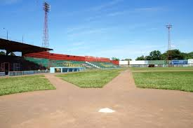 estadio